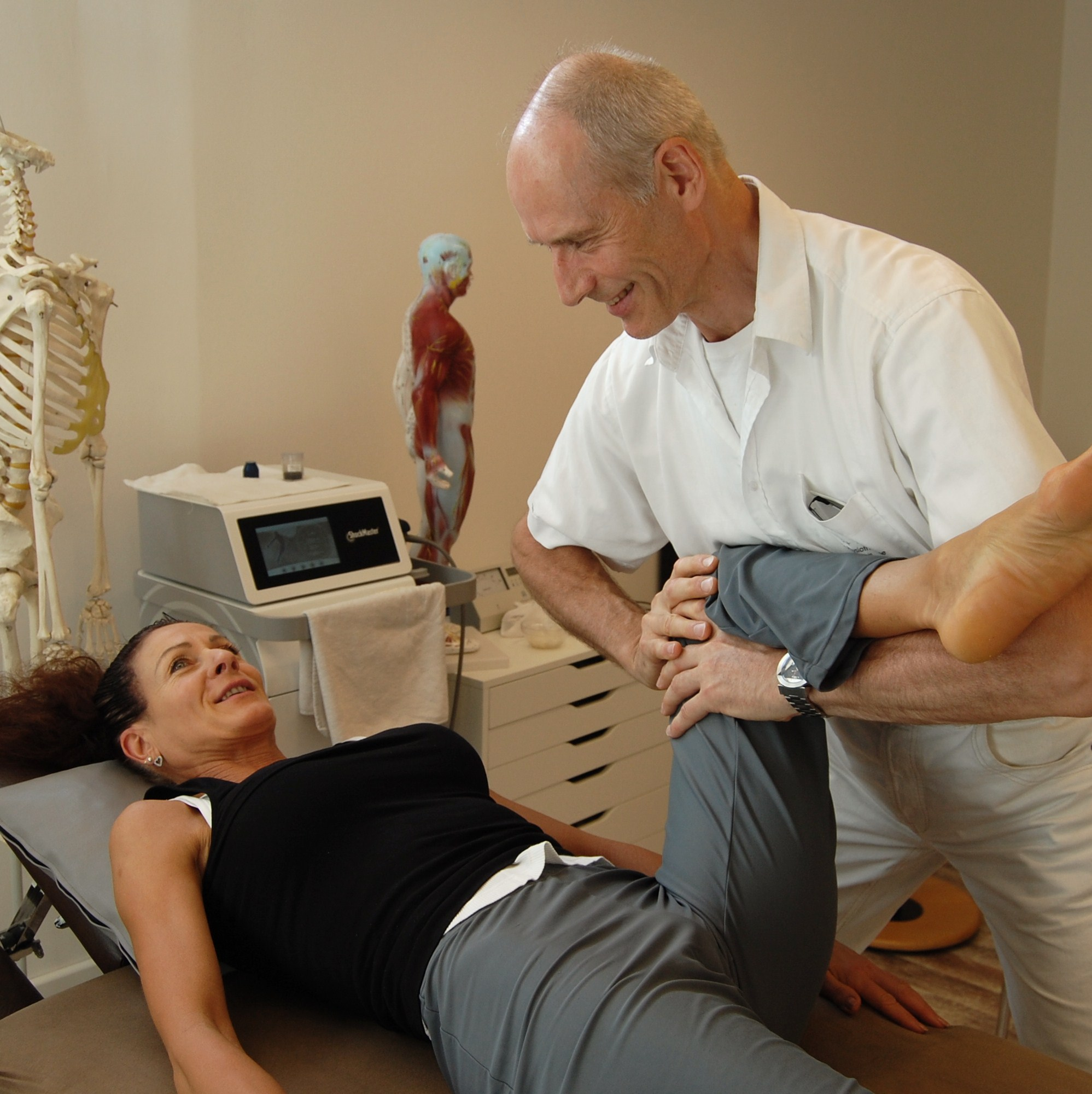 Physiotherapeut bei Behandlung zur Muskeldekontraktion